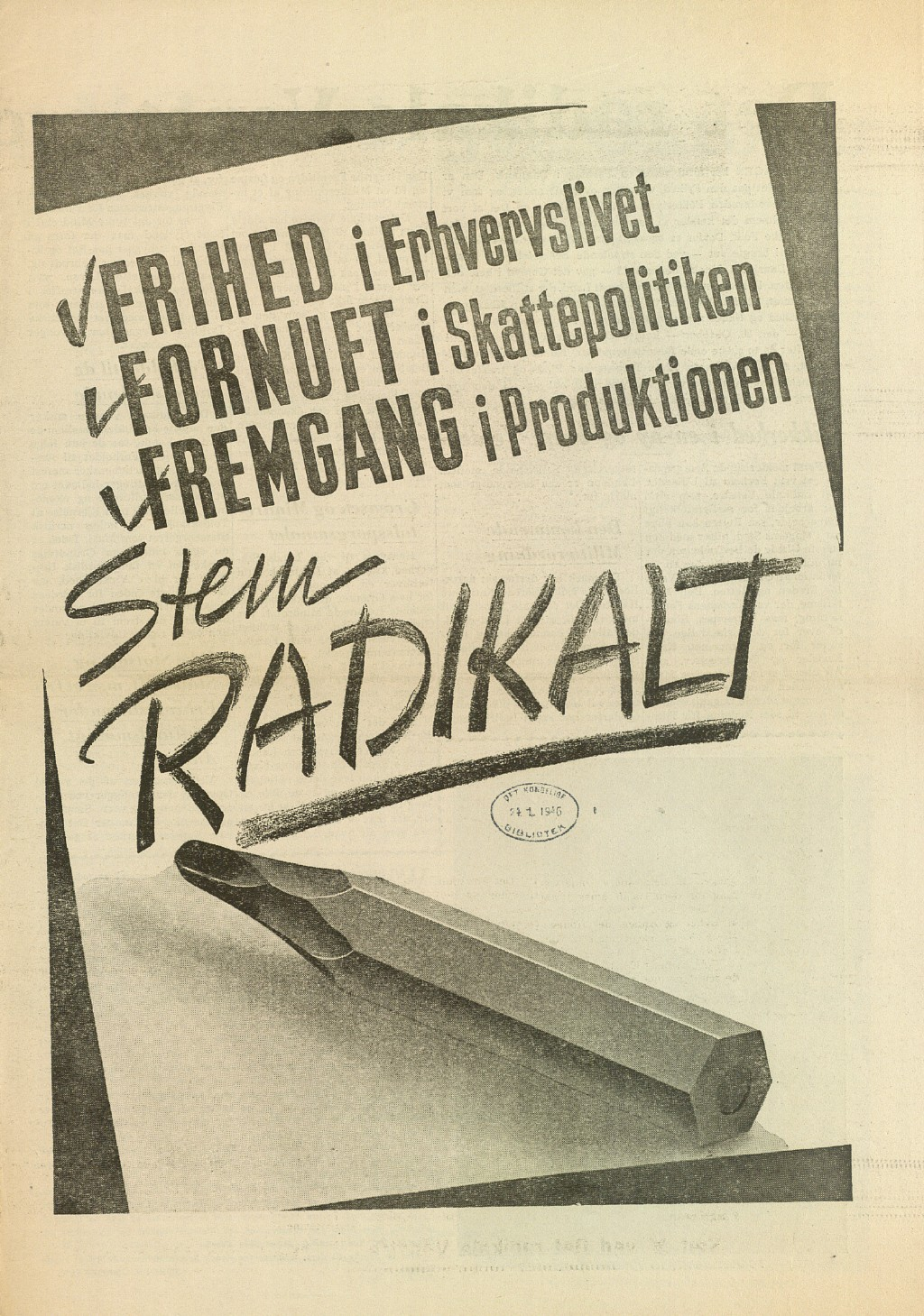 Frihed i erhvervslivet : Fornuft i skattepolitiken : Fremgang i produktionen : Stem radikalt. Udgivet av Det Radikale Venstre i forbindelse med folketingsvalget 30. oktober 1945.